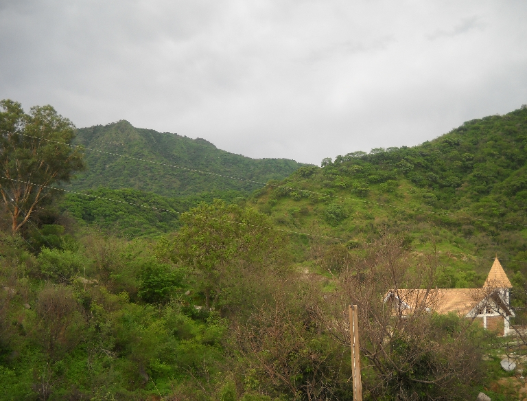 Localidad de Huixiopa y hacia el fondo el cerro del Peñasco donde colindan Chihuahua con Sinaloa.